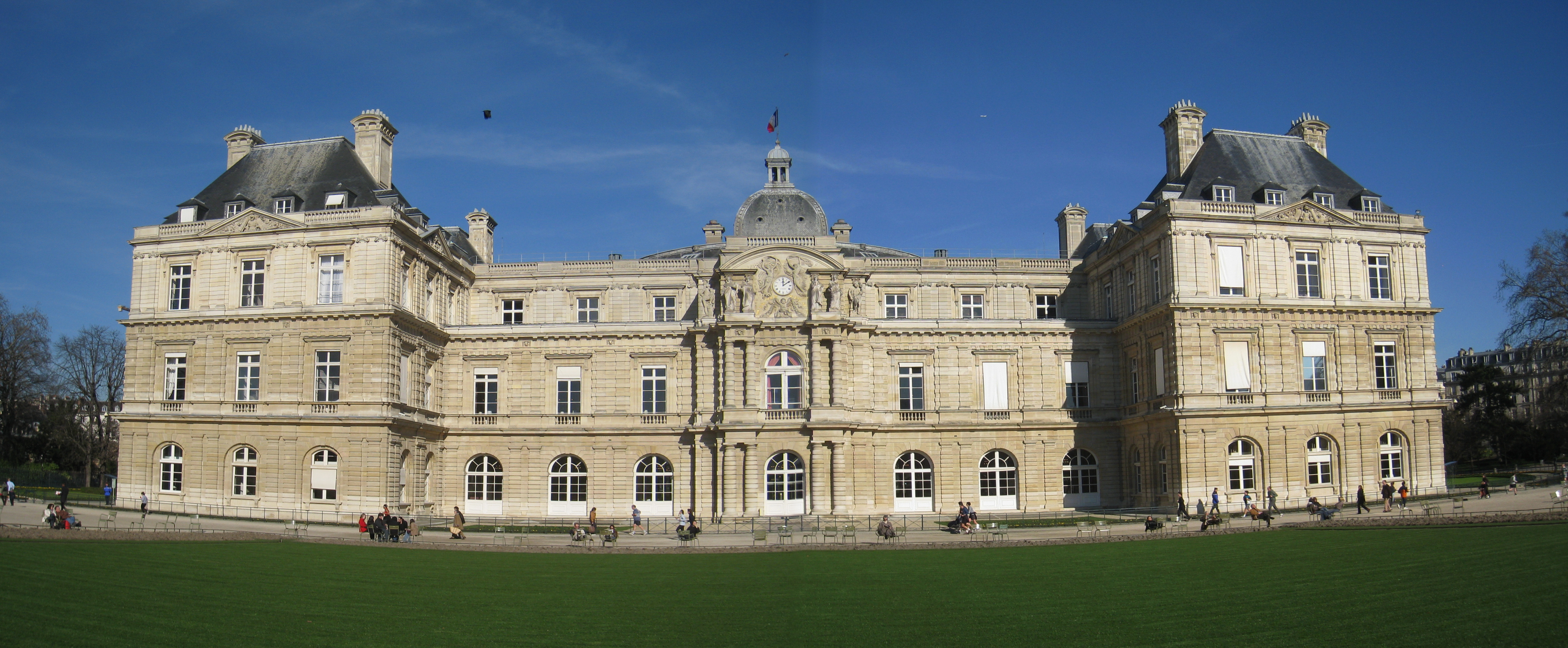 Palais du Luxembourg, Paris, France - panoramic image of garden-side facade.